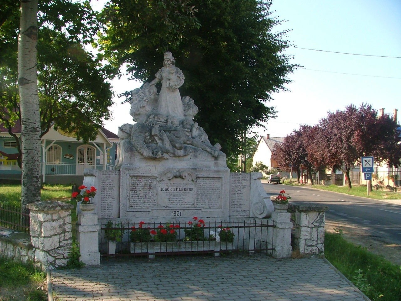 Első világháborús emlékmű (Écs, Magyarország)